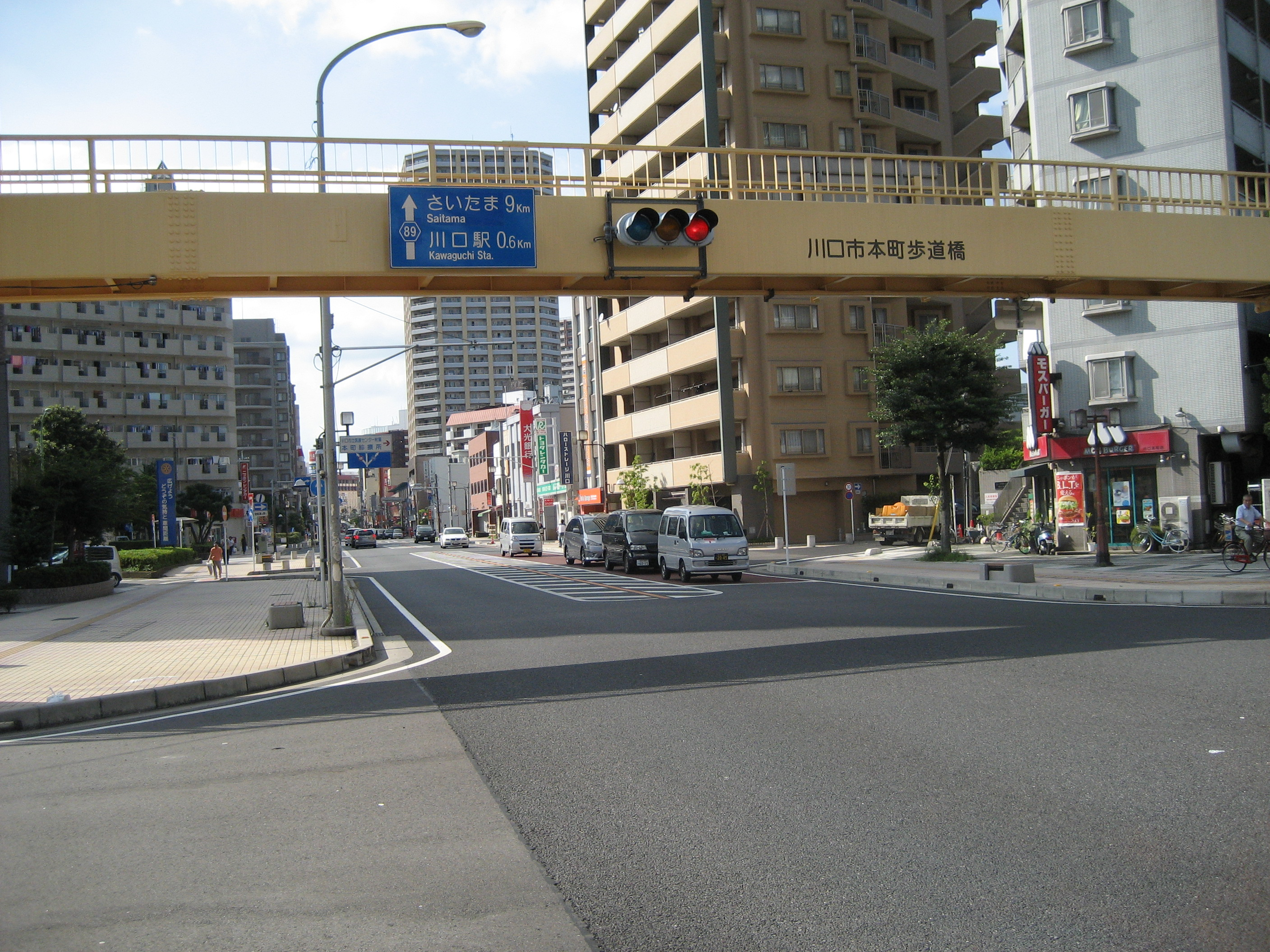 埼玉県道89号線川口駅東口方面を撮影